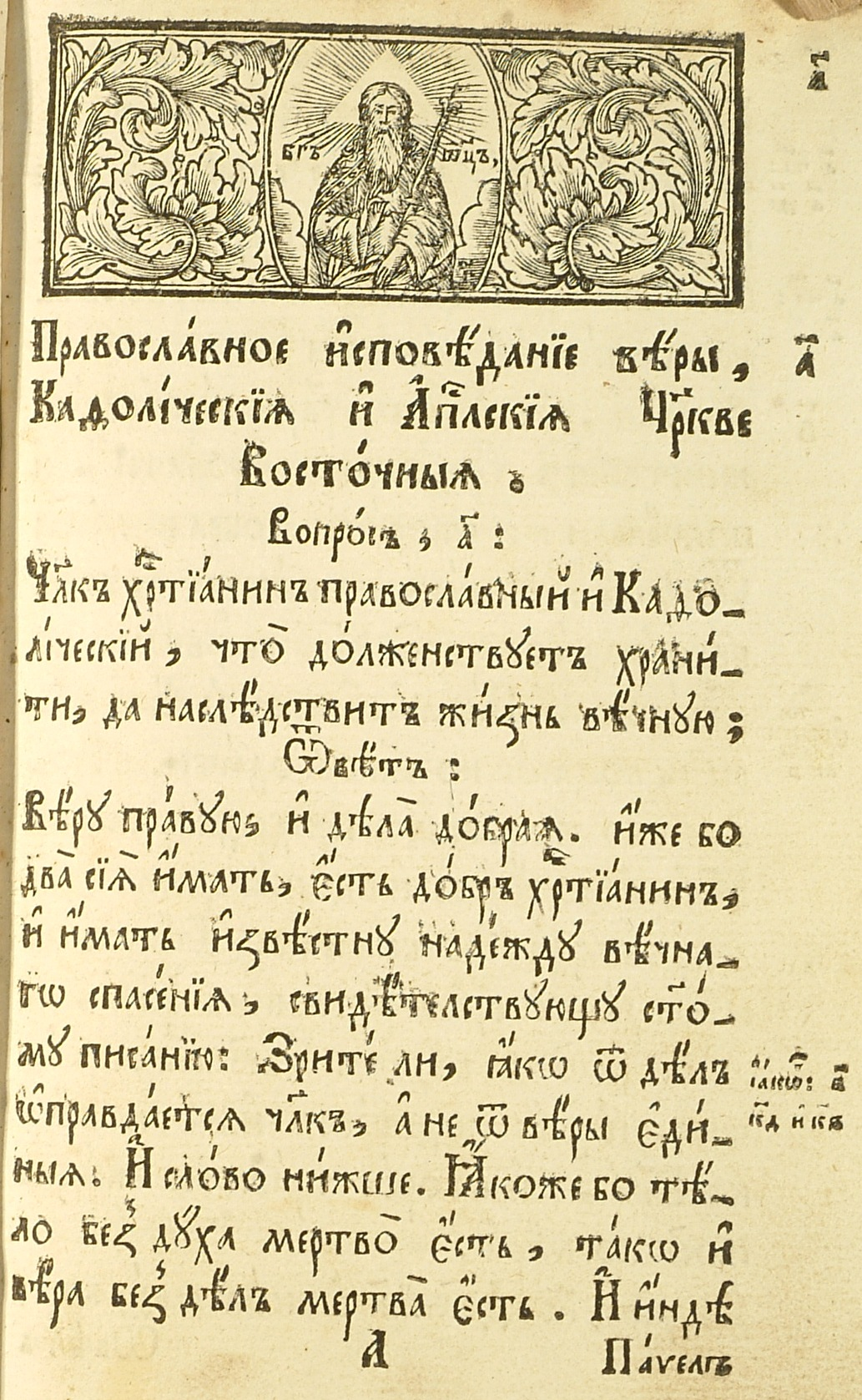 «Православне сповідання віри» або «Великий Катехизис» Петра Могили (Друкарня Києво-Печерської лаври, 1750).